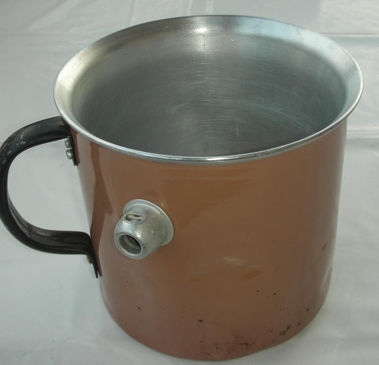 Simmeltopf aus Aluminium, hergestellt in der DDR